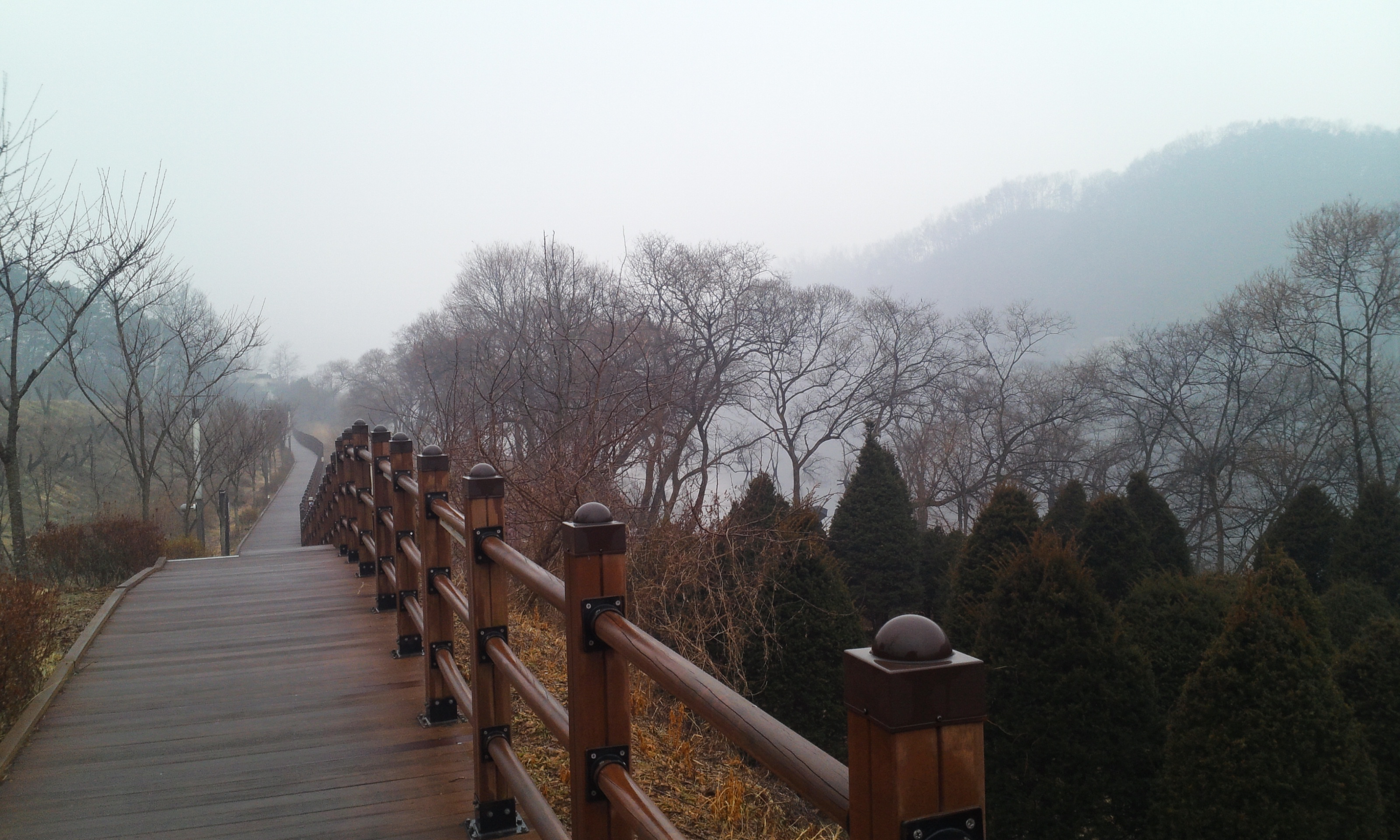 대청호오백리길 21구간_6